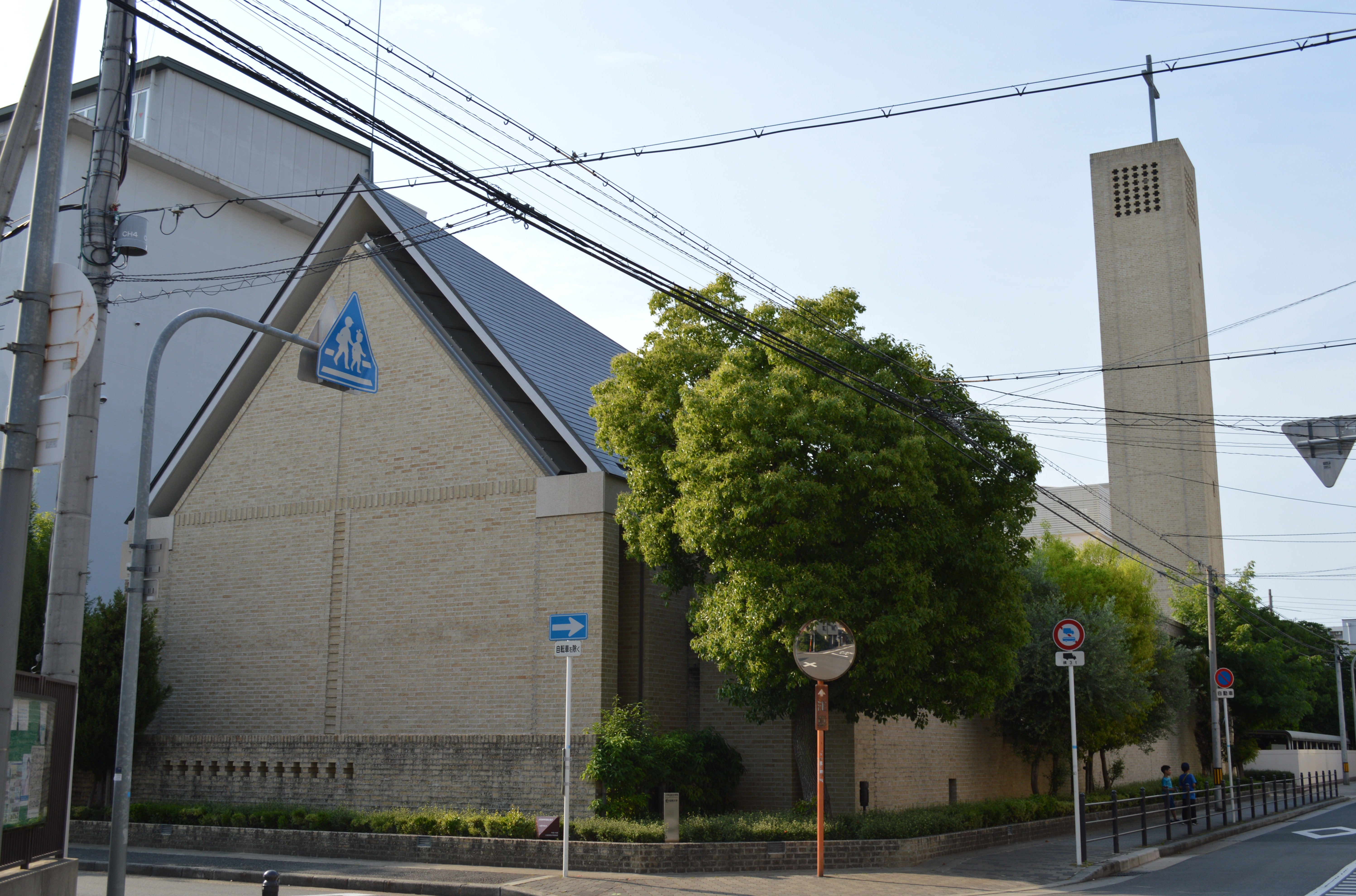 大阪市城東区古市 大阪信愛女学院短期大学城東キャンパス チャペル